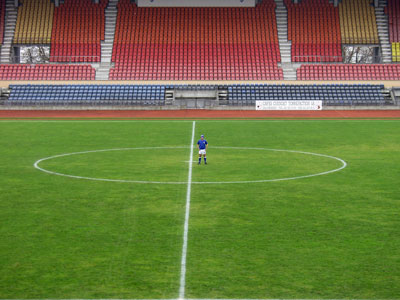 Massimo Furlan, Numero 23, Festival Les Urbaines, Lausanne, 2002